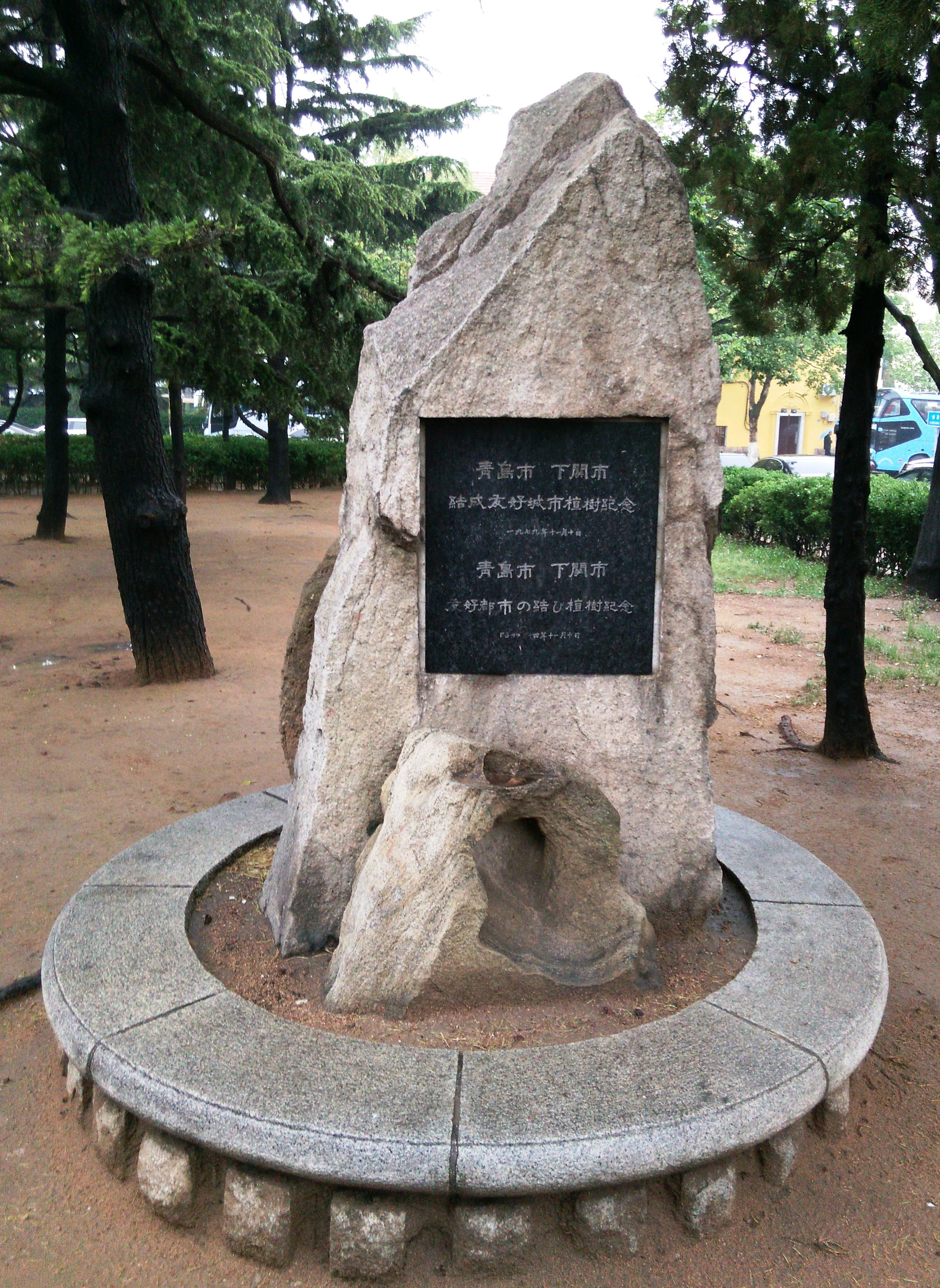 青岛市 下关市 结成友好城市植树纪念